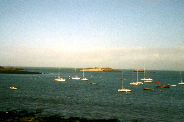 Brunec vu depuis Bananec. A droite des bateaux des Glénans (Glénans 5.7; goélette Folavoalh)